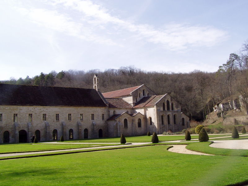 L'Abbaye de Fontenay, arrière de l'église et des bâtiments conventuels / photo personnelle de F Thurion (alias Accrochoc prise le 26 mars 2006.